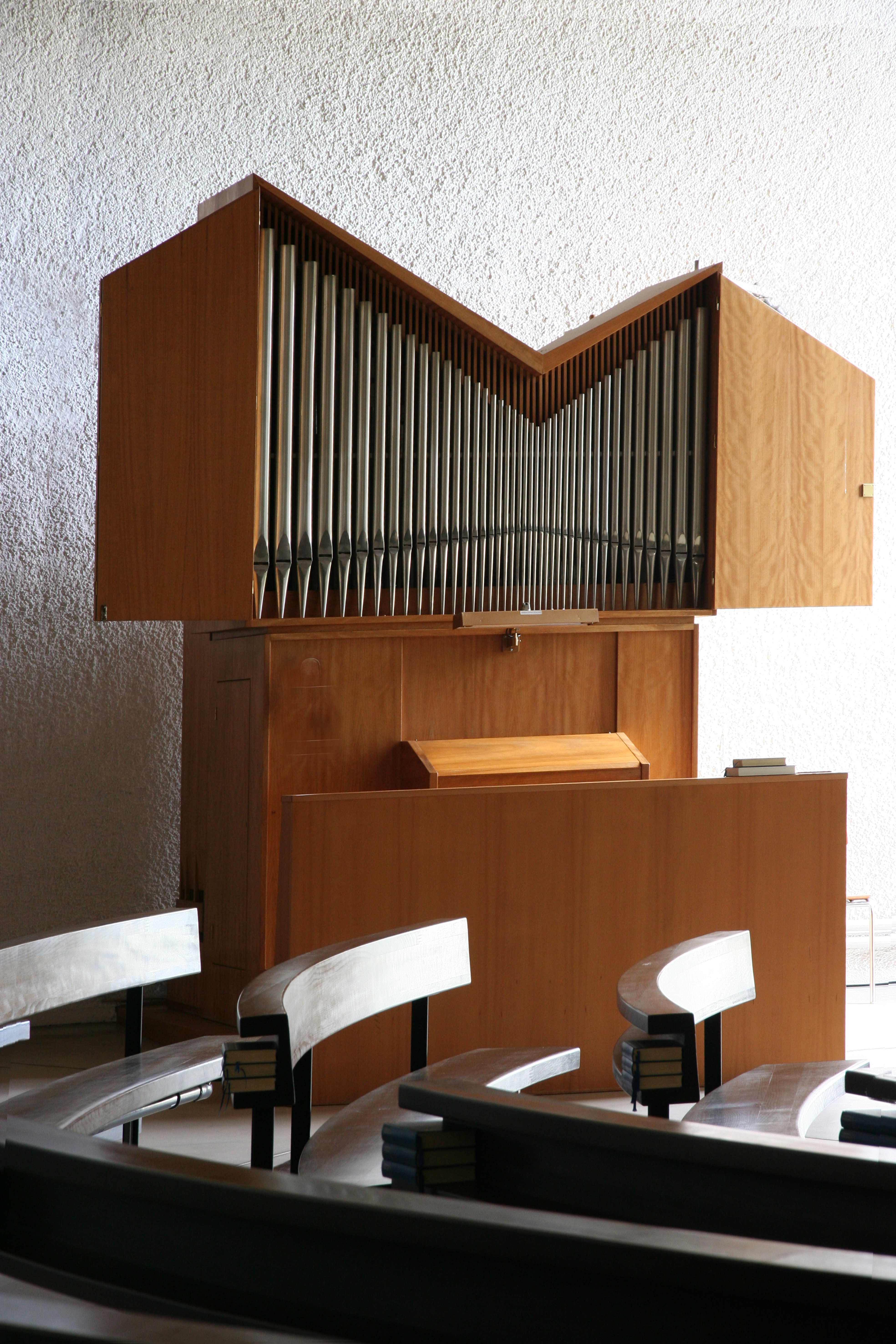 Römisch-katholische Kirche St. Jakobus Hütten ZH